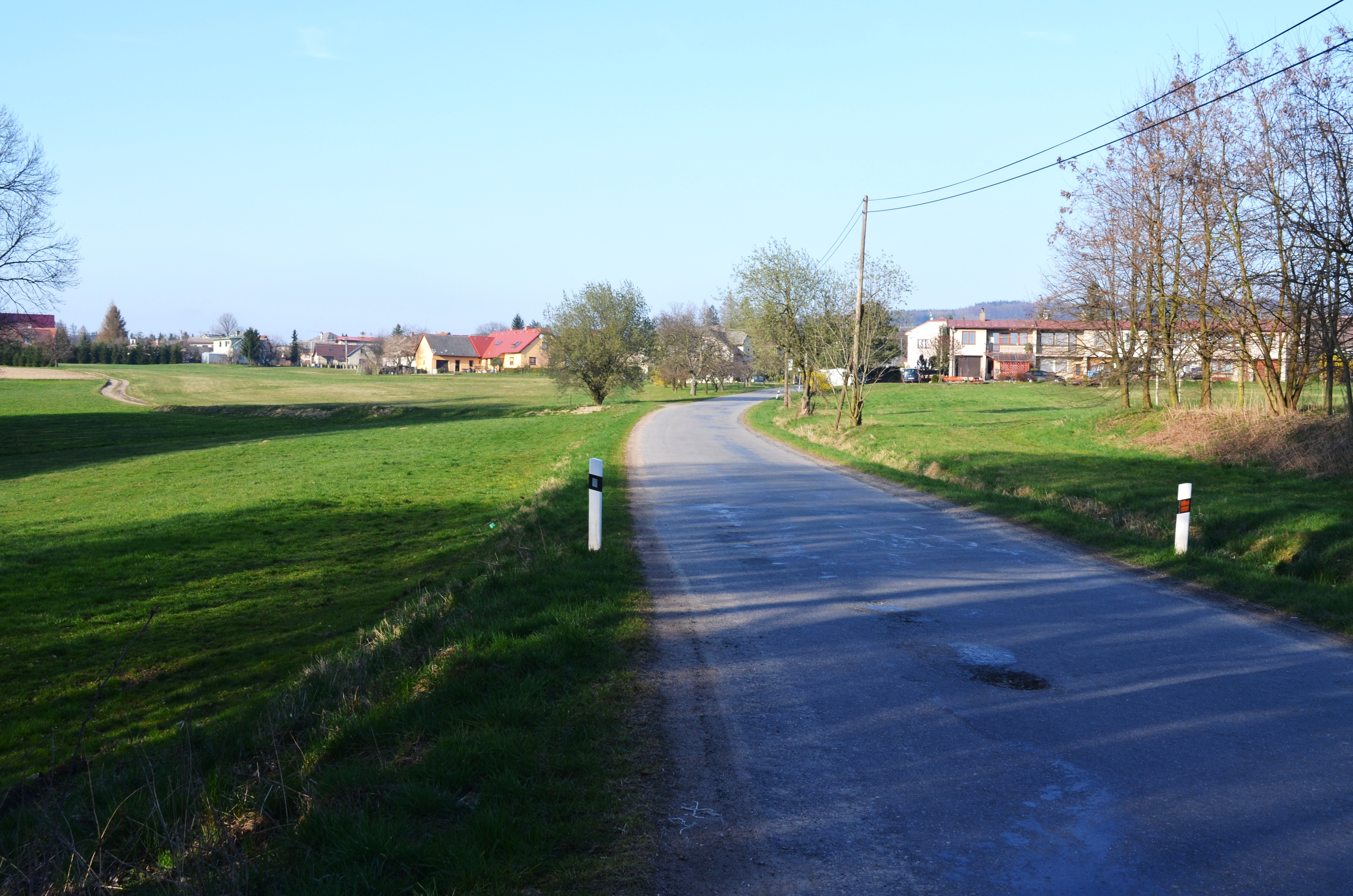 Obec Jestřebí